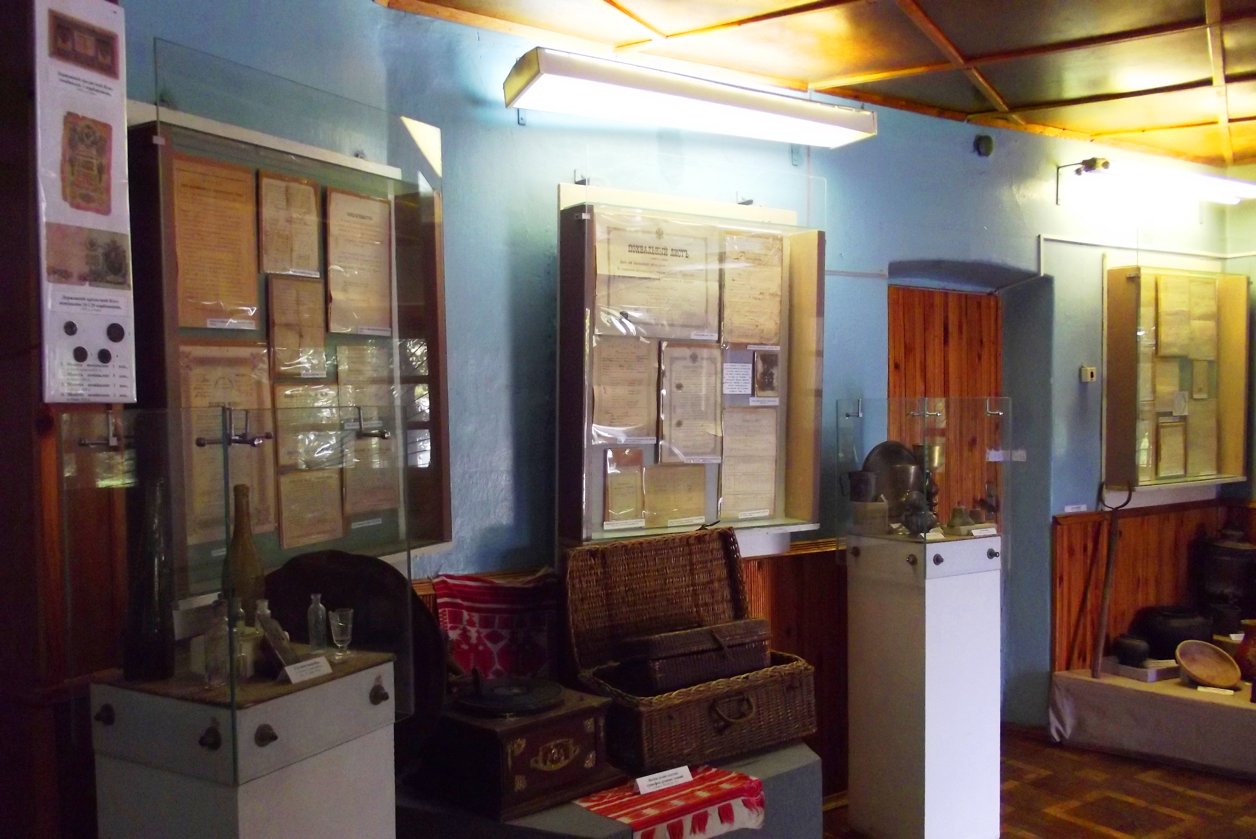 Канівський історичний музей (Черкаська область, Україна)